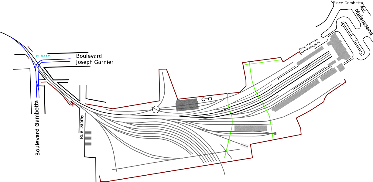 Plan de la Gare du Sud avec description. En gris les voies dédiées au garage des trains, en noir les voies pour les trains de voyageurs. En vert les traits orthodromiques. Les zones en gris foncées correspondent aux bâtiments. En rouge bordeaux : les emprises ferroviaires. En bleu les voies du TNL